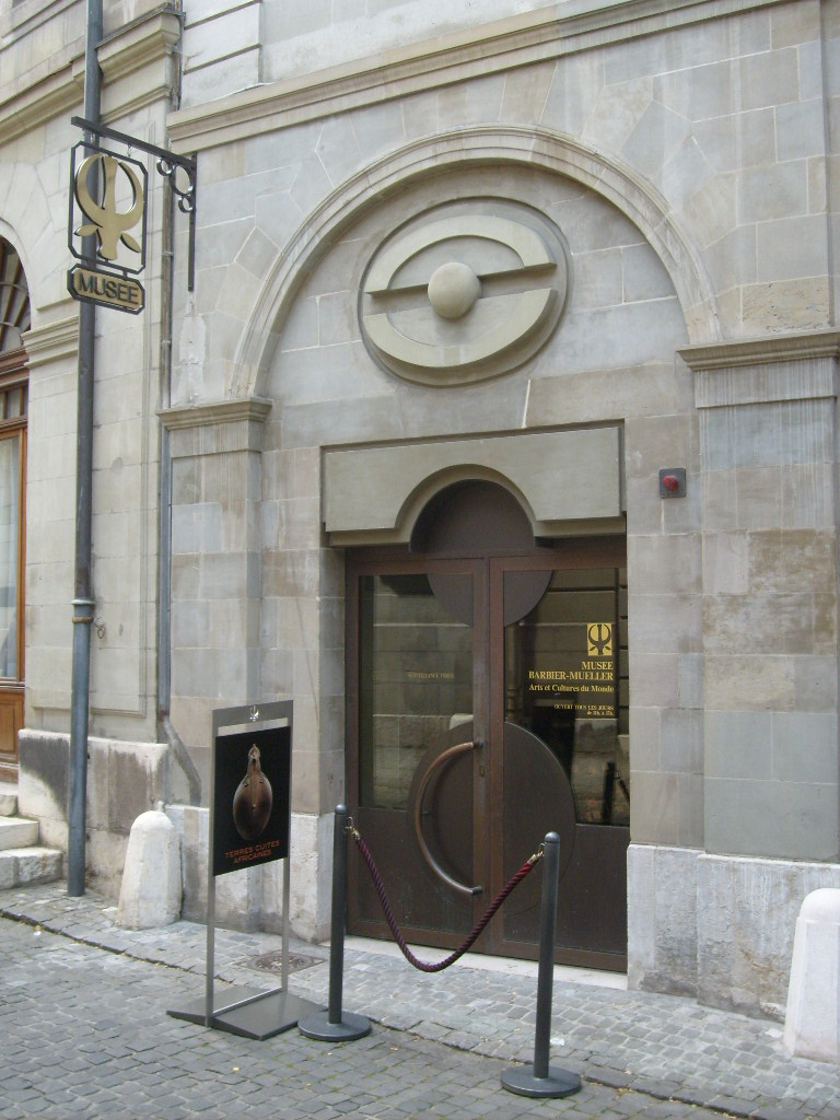 Entrée du Musée Barbier-Mueller à Genève (Suisse)